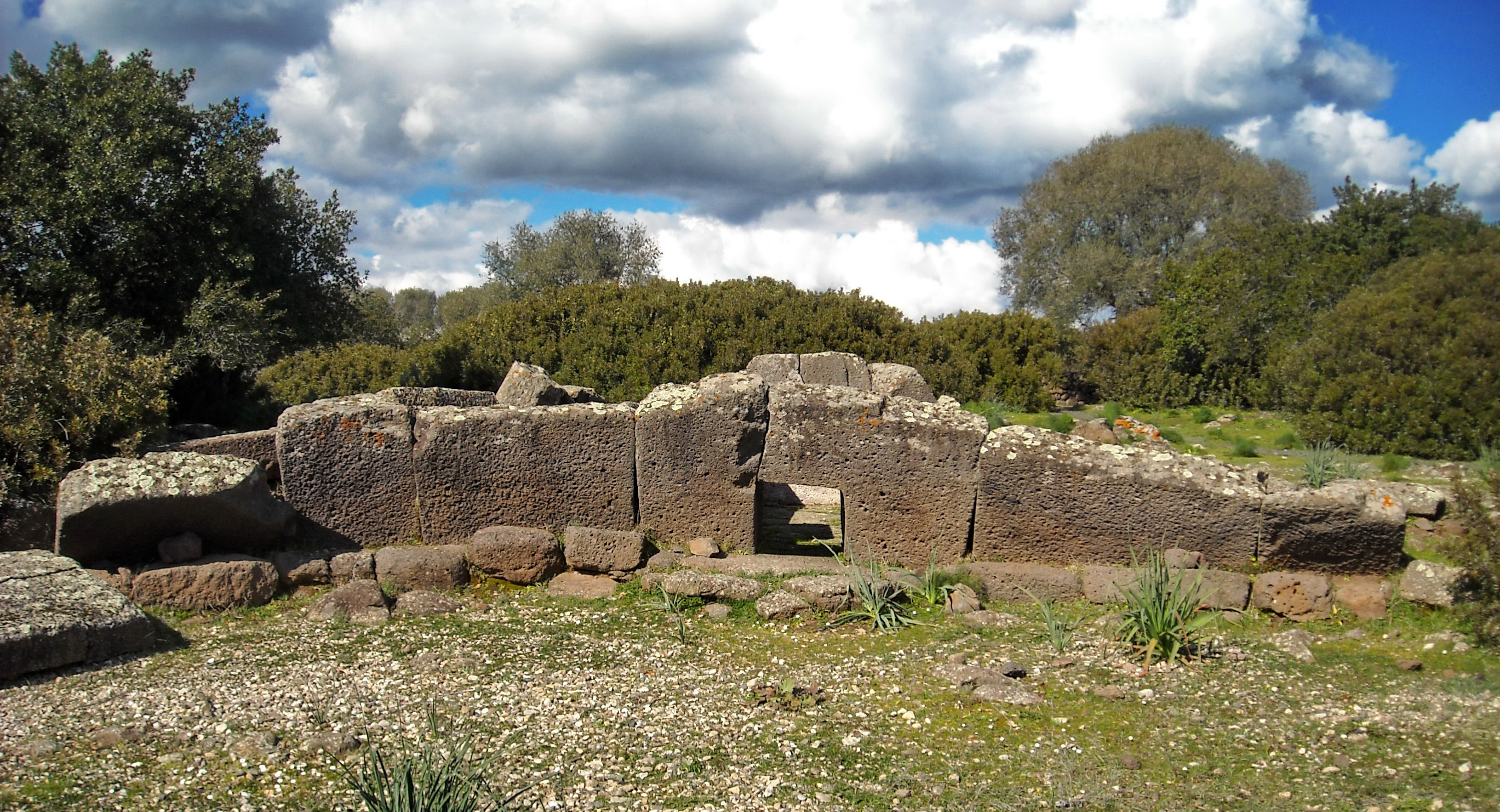 Nuraghe e tomba di gigante n.2 di Iloi - MIBAC This is a photo of a monument which is part of cultural heritage of Italy.